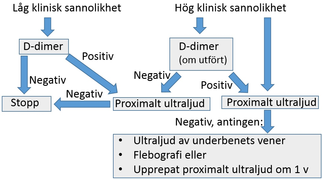 Algoritm för utredning av djup ventrombos. Referens: Docent Henry Eriksson, Med dr, överläkare Fariba Baghaei, Specialistläkare Valerie Bockisch, Professor emerita Margareta Hellgren, Docent Leif Lapidus, Överläkare Per-Åke Moström, Med dr, Överläkare Vladimir Radulovic, Överläkare Lennart Stigendal.. Djup ventrombos, DVT. Internetmedicin.